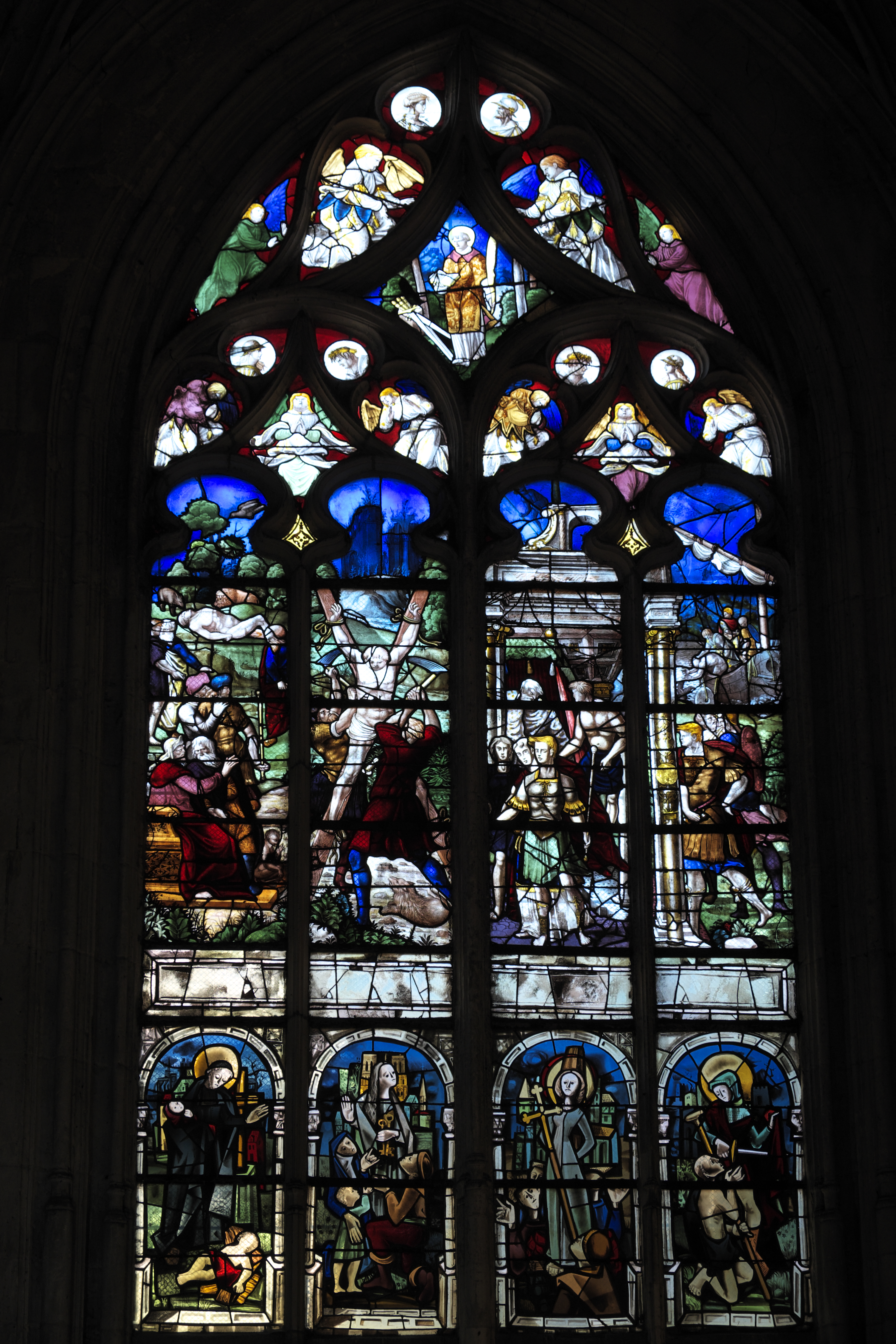 Katholische Kirche Saint-Ouen in Pont-Audemer im Département Eure (Haute-Normandie/Frankreich), Bleiglasfenster aus dem 16. Jahrhundert, Darstellung: Martyrium des hl. Vinzenz; unten moderne Scheiben von Max Ingrand: hl. Vinzenz von Paul, hl. Genoveva, Johanna von Orléans, hl. Martin